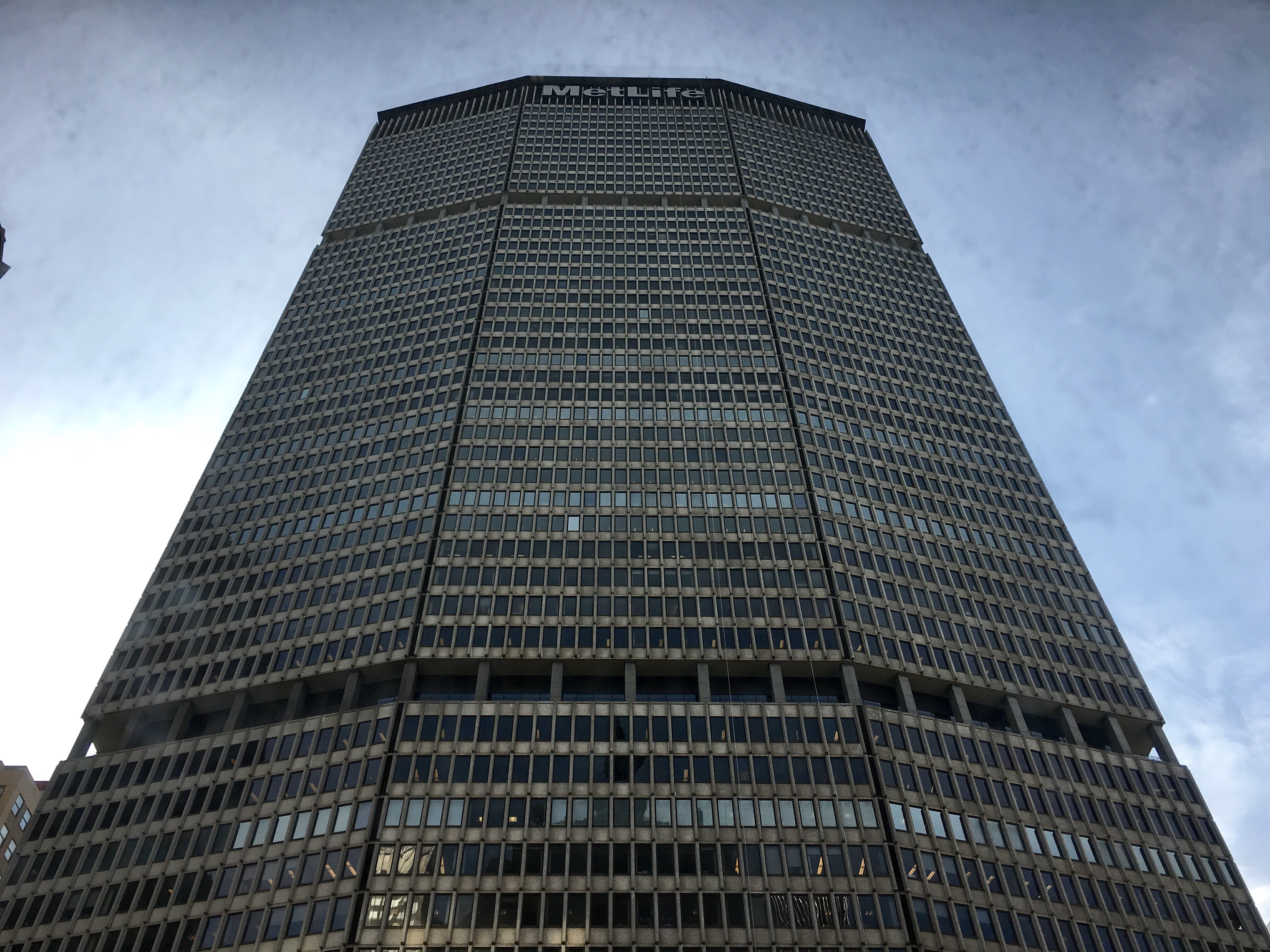 Pan Am building, always